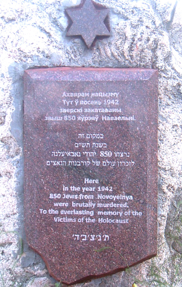 Надпись на памятнике евреям деревни Новоельня Дятловского района Гродненской области, убитым нацистами осенью 1942 года.